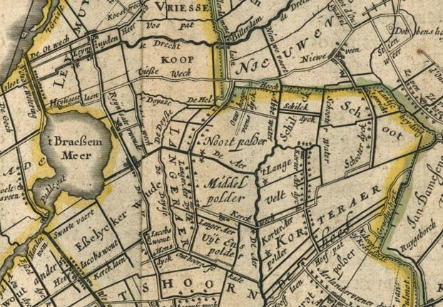 Ter Aar, Middelpolder, Rijnland amstelland Bloklandsche_Polder, Korteraarsche_Polder en Uiteindsche_en_Middelpolder